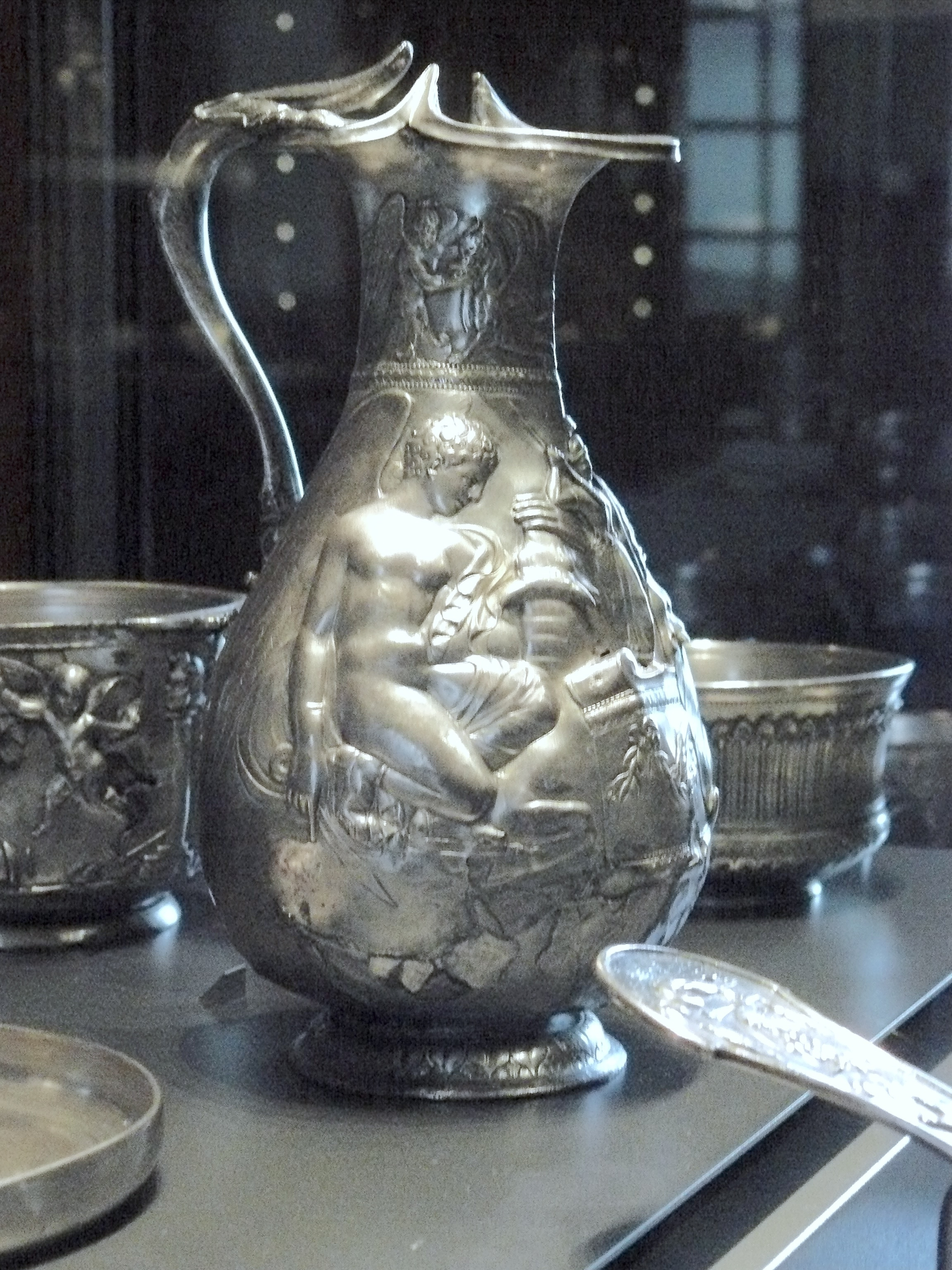 Oenochoé du trésor de Boscoreale - Vase à vin en argent décors repoussé, traces de dorure, fin du Ier siècle ap. J.C. - Hauteur environ 25 cm. Musée du Louvre, Inv. n° BJ 1899